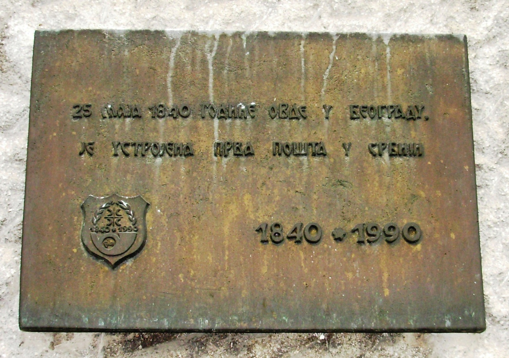 Tabla u ulici kralja Petra I, odmah pored kafane "?". Slikao Goldfinger